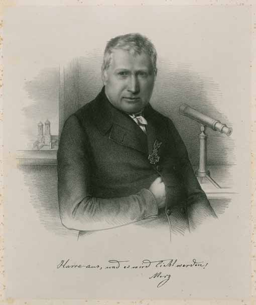 ritratto di Georg Merz